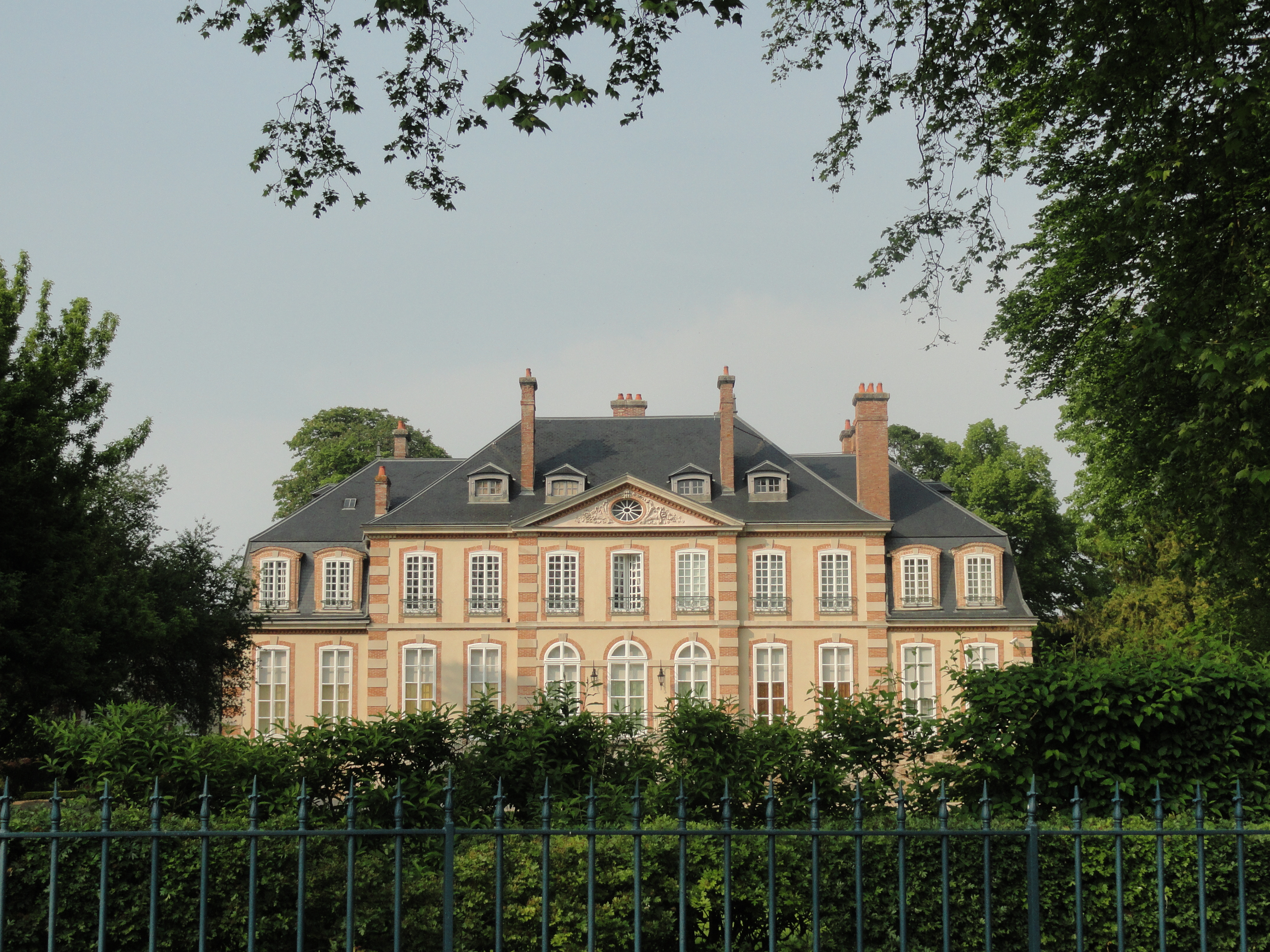 Façade sud du Château de Mareuil-sur-Ay.